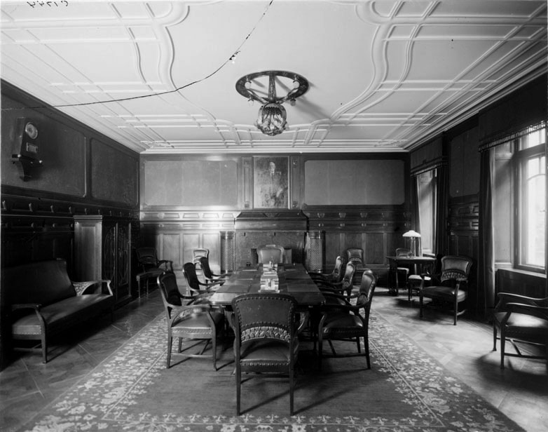 Interiör ifrån styrelserum i Sundsvalls Enskilda Bank, Fredsgatan 4 År 1905